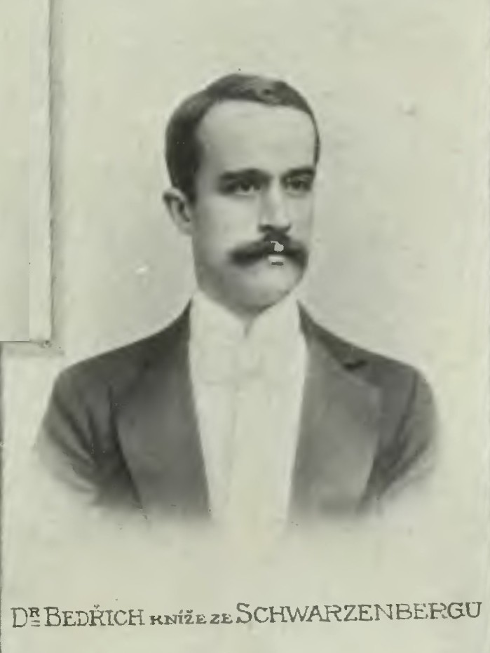 Portrét – Bedřich Schwarzenberg (1862-1936), Rakouský a Český politik.